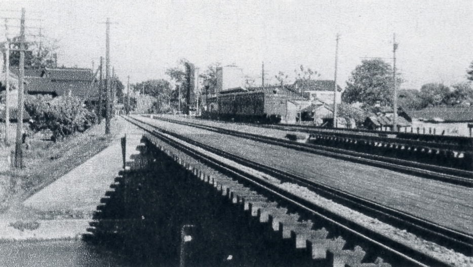 富山田地方駅（電車のうしろ）付近